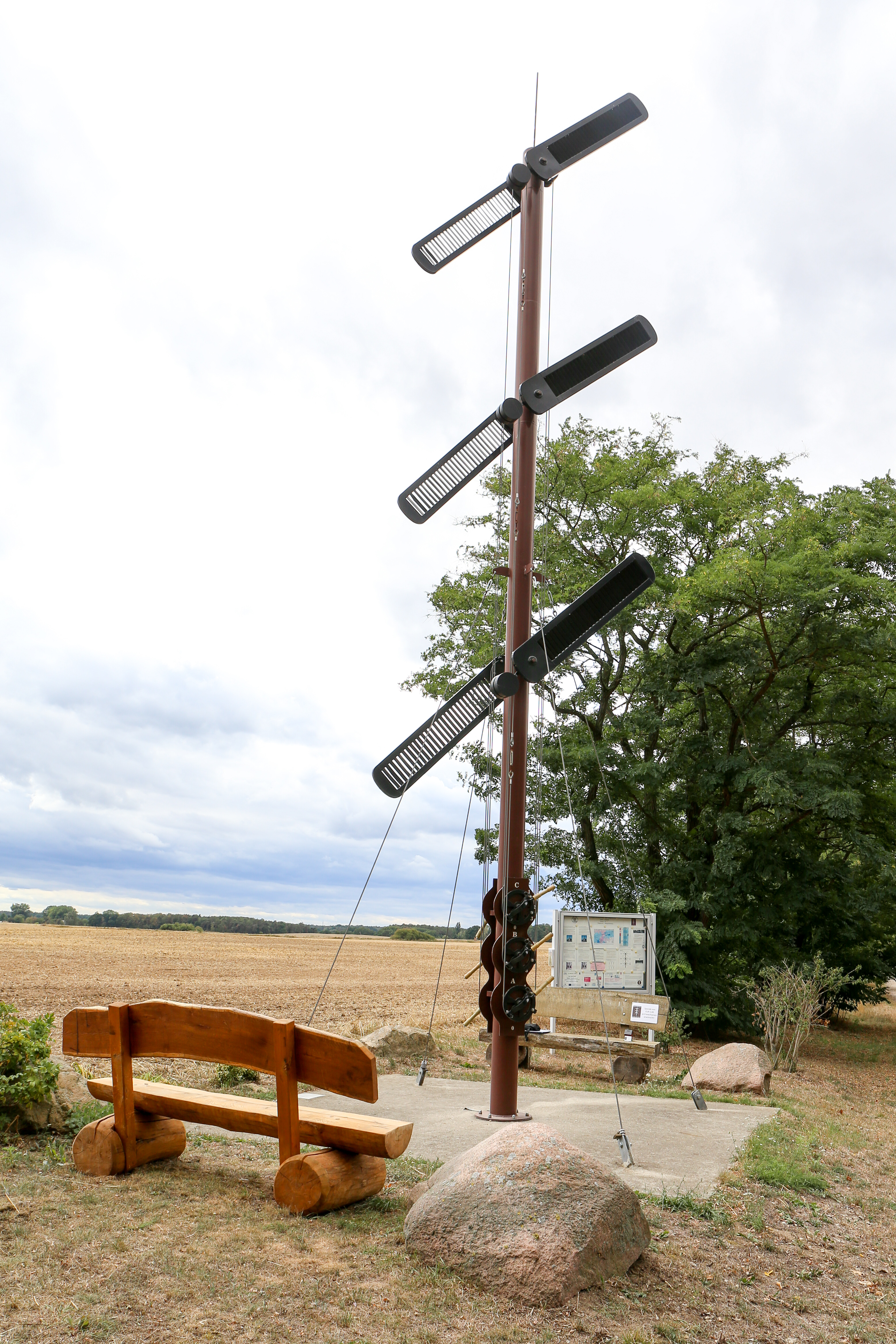 Ziegelsdorf ist ein Ortsteil von Möckern im Landkreis Jerichower Land in Sachsen-Anhalt.